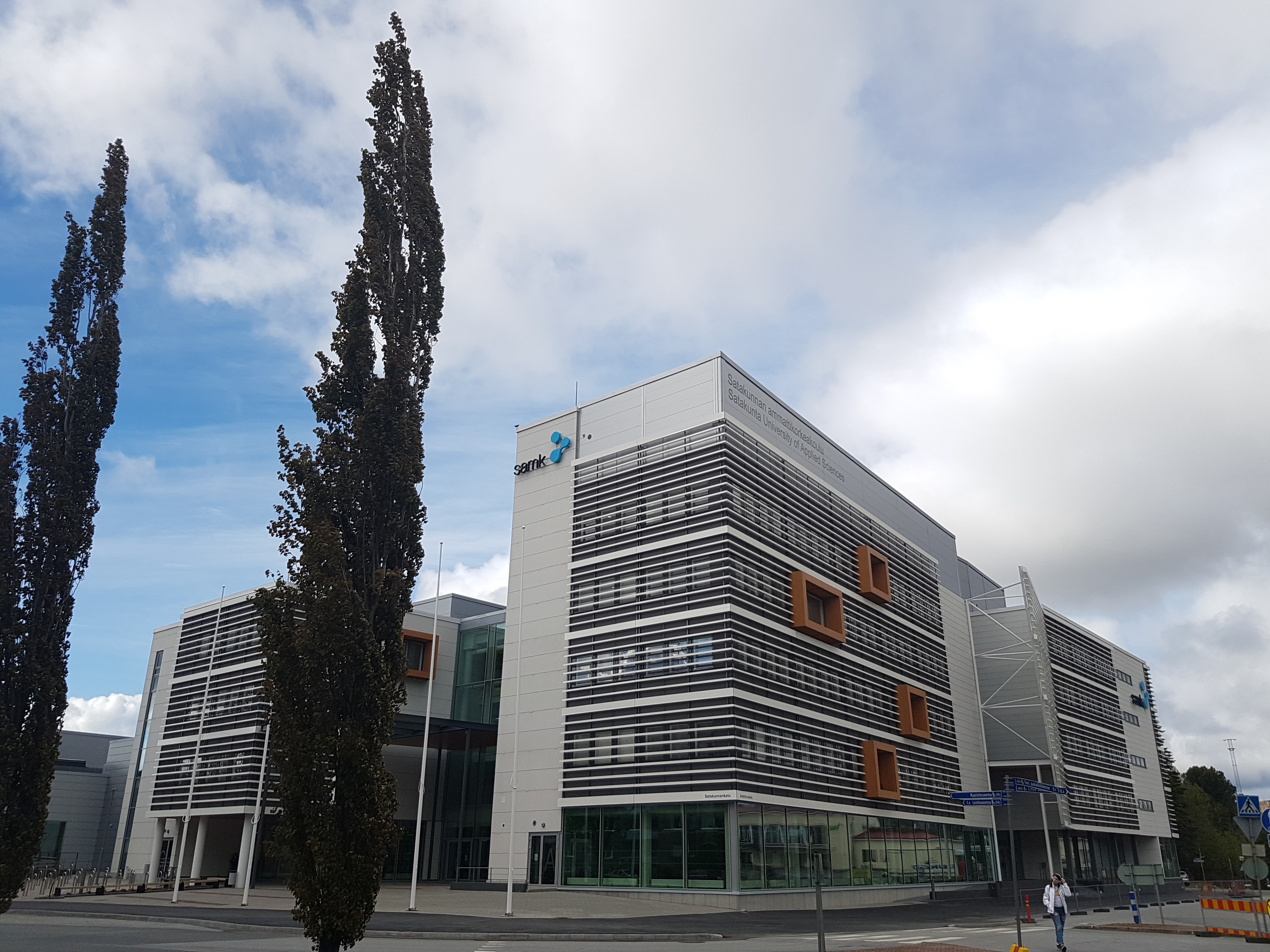 Satakunnan ammattikorkeakoulun vuonna 2017 valmistunut kampuskiinteistö Porissa